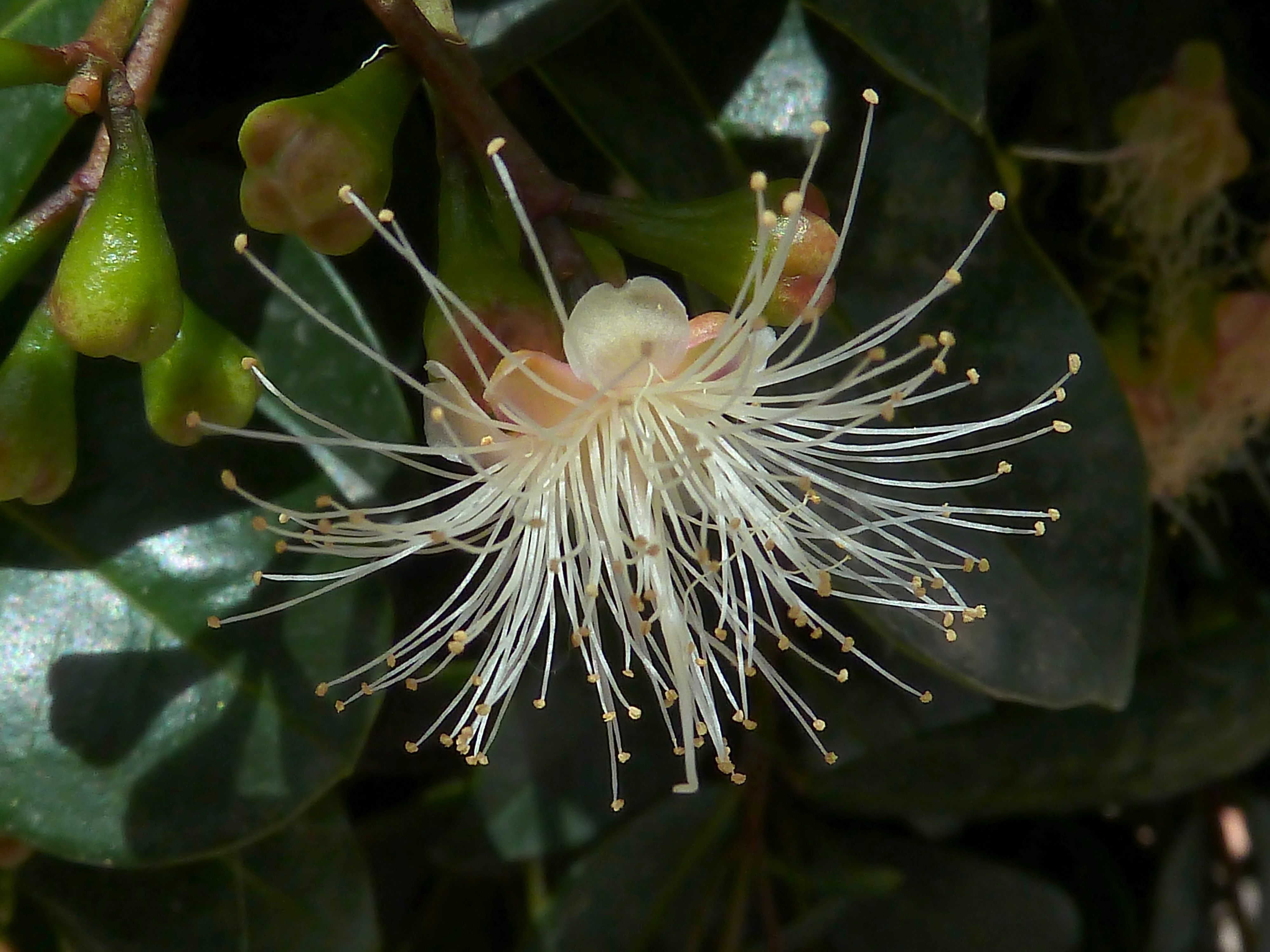 Syzygium australe - Flor en antesis - Cultivado/ornamental, Pza de España con Ramón y Cajal, Albatera, Provincia de Alicante (España).